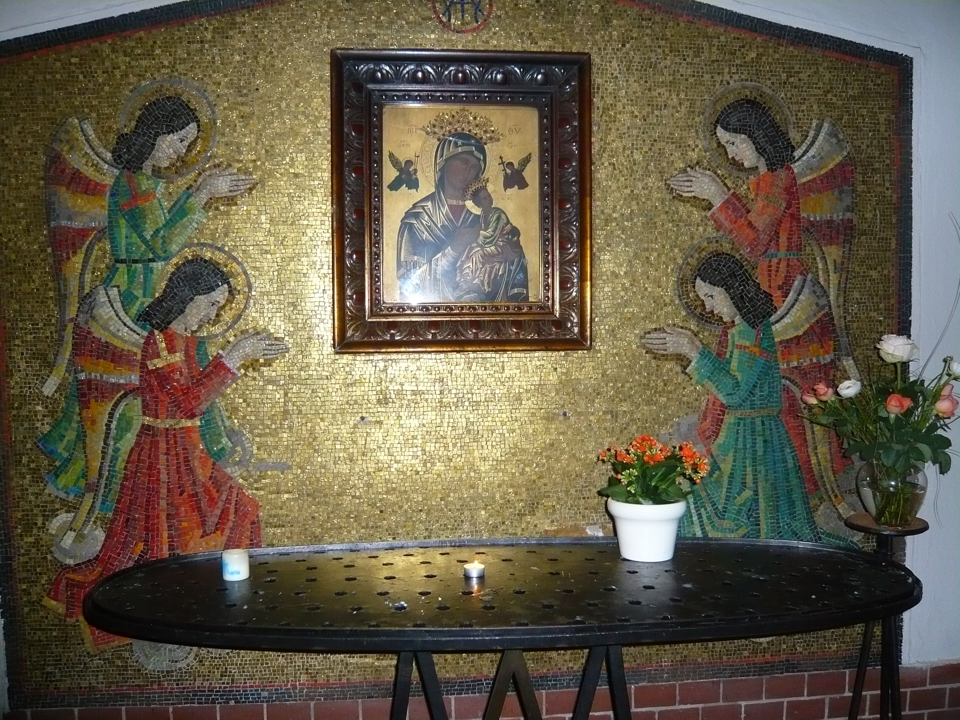 Kath. Kirche S. Corpus Christi, Prenzlauer Berg, Conrad-Blenkle-Straße